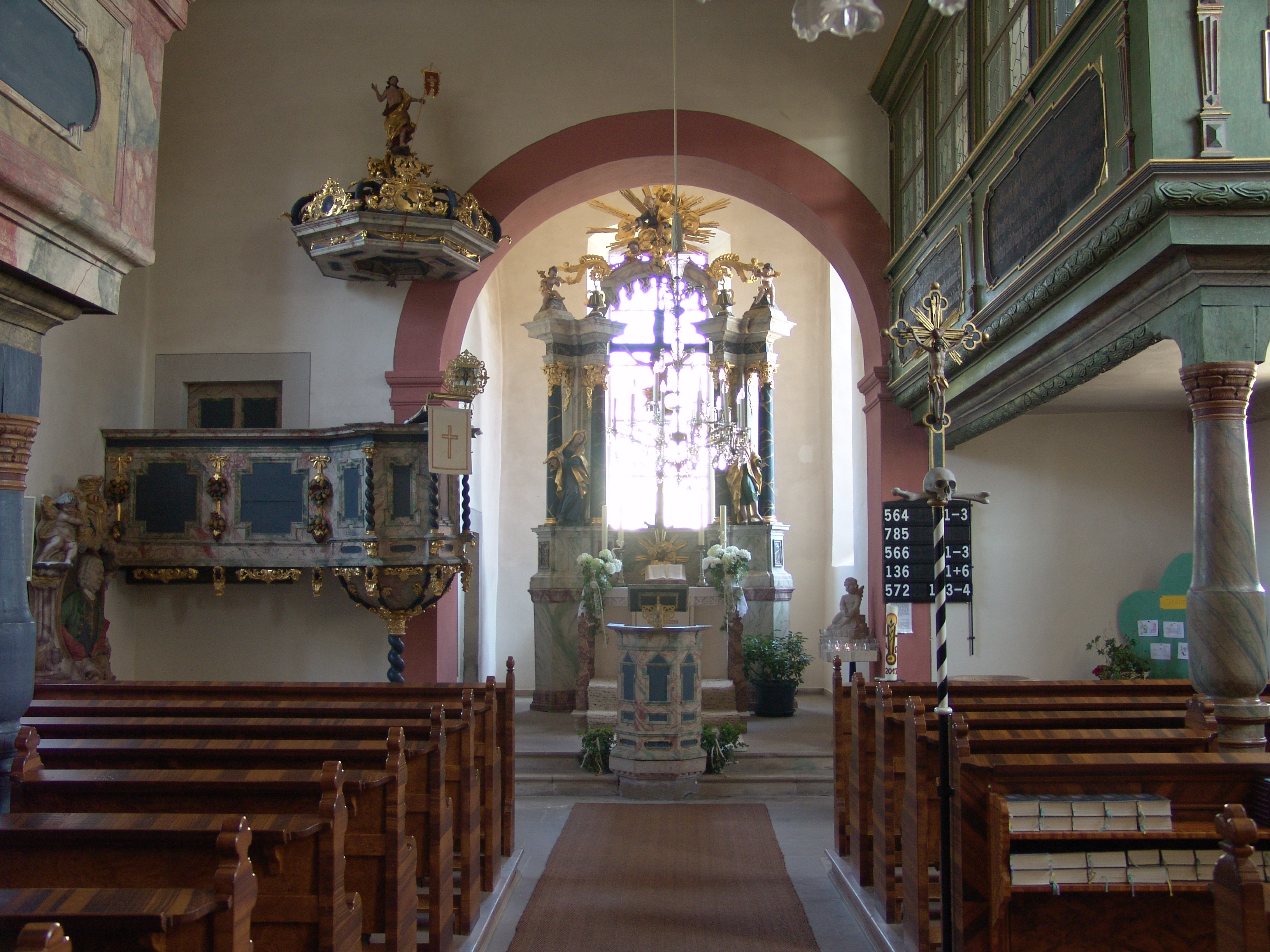 evang.-luth. Kirche in Höchheim